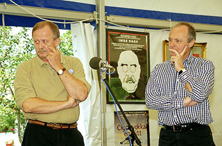 Kuncze Gábor és Medgyessy Péter - Szárszói Találkozó 2001